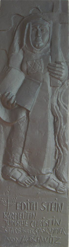 Diese Platte hängt in der Katholischen Kirche Wittenberg. Die Kirche erhielt die Platte als Geschenk des Kronacher Bildhauers Heinrich Schreiber.